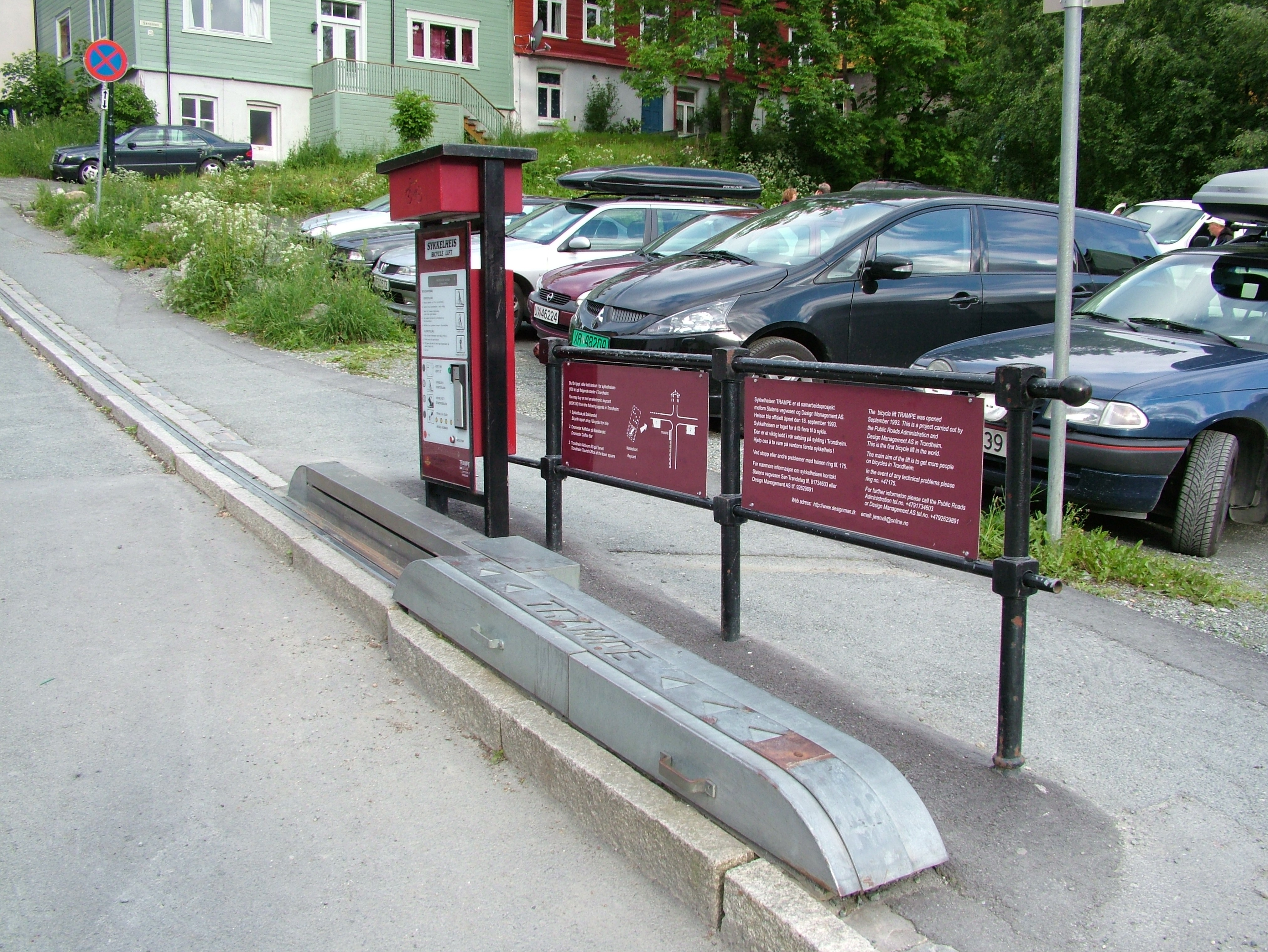 Der Fahrradlift in Trondheim Norwegen. Selber fotografiert am 24.06.2005. Bicycle lift in Trondheim